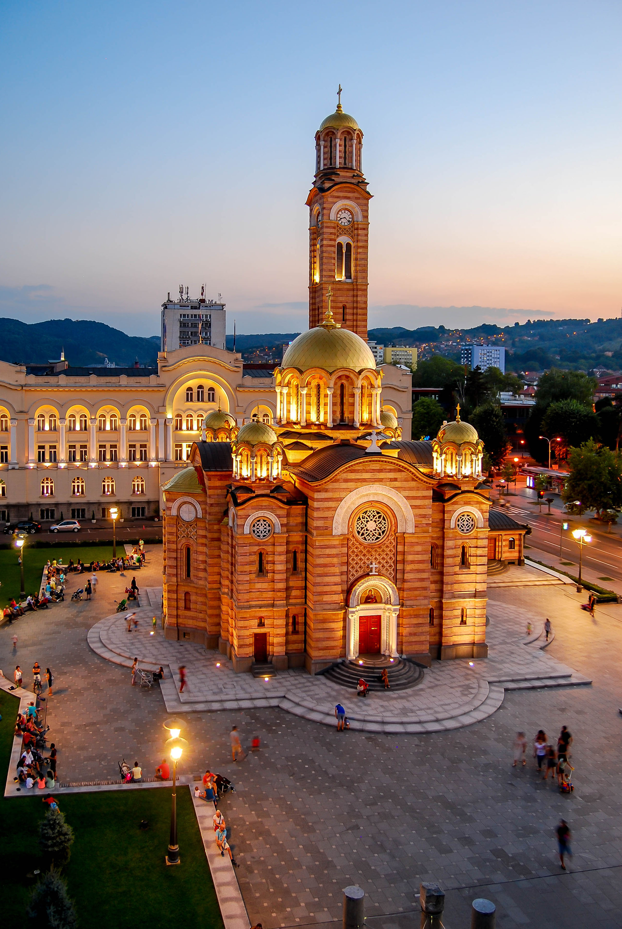 Саборна црква Христа спаситеља, Бања Лука ID добра: NKD115 Саборни храм Христа Спаситеља у Бањој Луци данас се налази на мјесту гдје је накада била Црква Свете Тројице, направљена између два свјетска рата у центру Бање Луке. Изградња храма трајала је од 1925. до 1929, а свечано је освештана на Спасовдан 1939. године. Ova fotografija je lično za mene posebna iz razloga što sam na krovu Banskog dvora proveo skoro 4 sata, kako bi mogao hram da fotografišem u različito doba dana, po danu, sumrak i noćnu fotografiju.